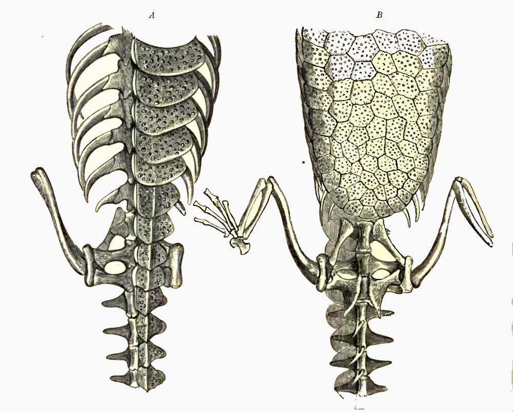 Teleosaurus cadomensis